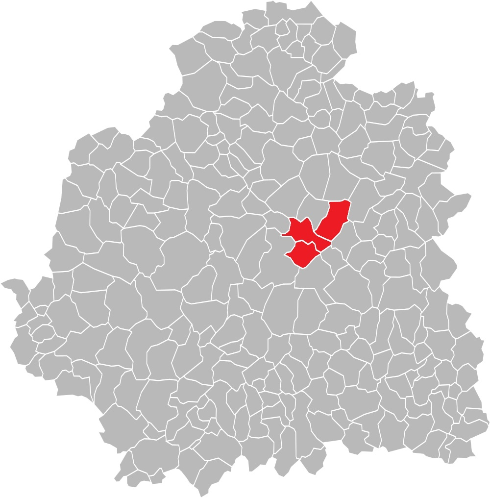 Carte des communes de l'Indre (36) : Le canton de Châteauroux-Est, de 1973 à 2015.